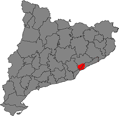 Àrea de la Denominació d'Origen Alella